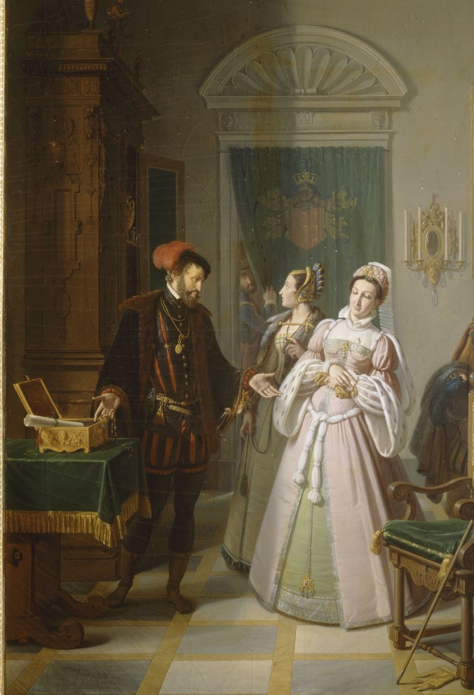 Le Roi de Navarre et Jeanne d'Albret, mère d'Henri IV. Huile sur toile.